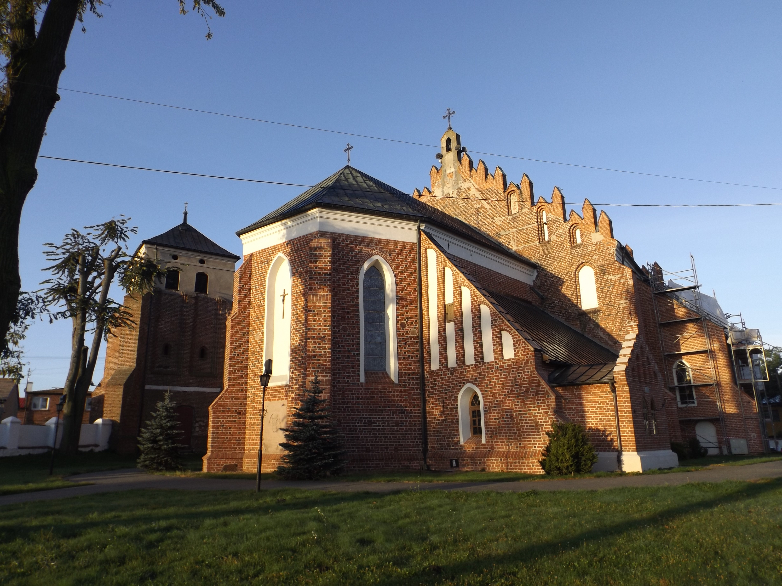 Szadek, kościół Wniebowzięcia Matki Boskiej, XIV, XVI, XIX